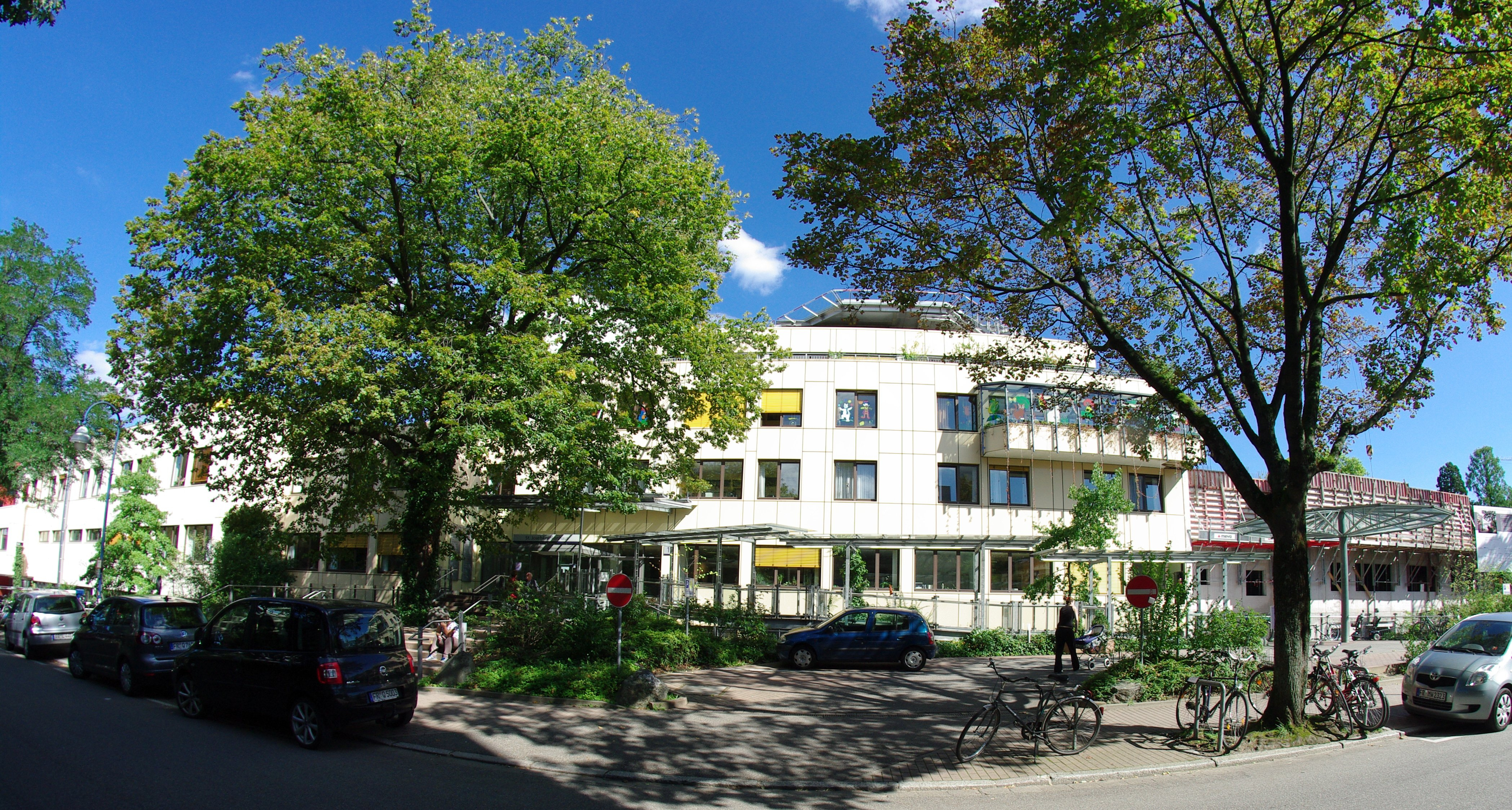 Eingangsbereich des St. Josefskrankenhauses im Ergänzungsneubau St. Hedwig (1988), rechts ein weiterer Anbau, der 2012 fertiggestellt wurde